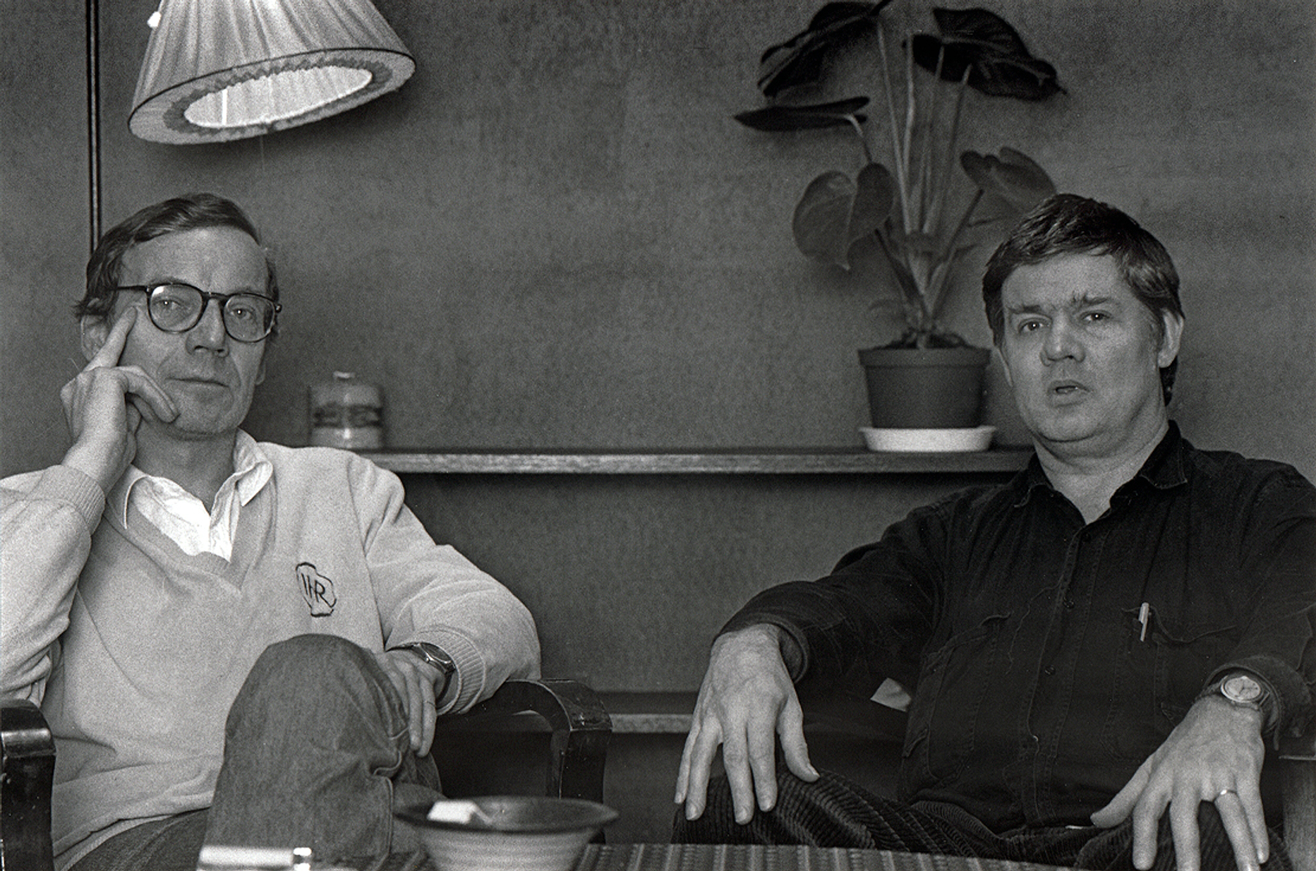 Håkan Alexandersson och Carl Johan De Geer 1987.